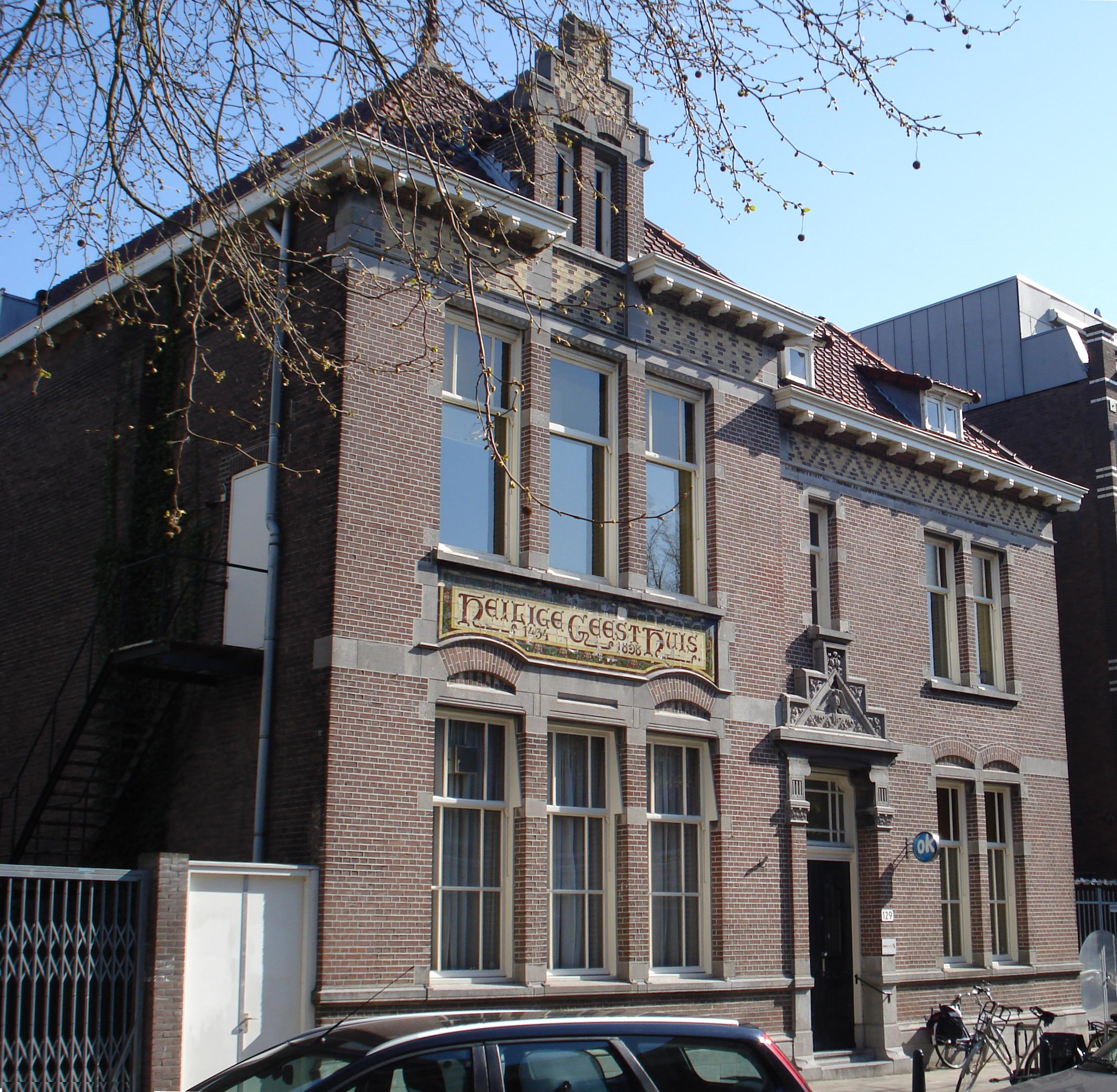 Rotterdam, Gerard Scholtenstraat 129. Gemeentemonument.